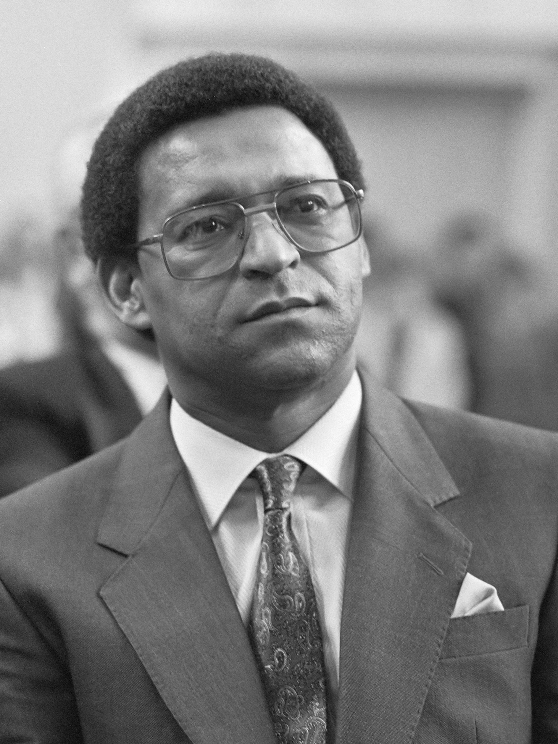 Zuidafrikaanse dominee Allan Boesak bezocht theologisch Hogeschool in Kampen 4 juni 1986